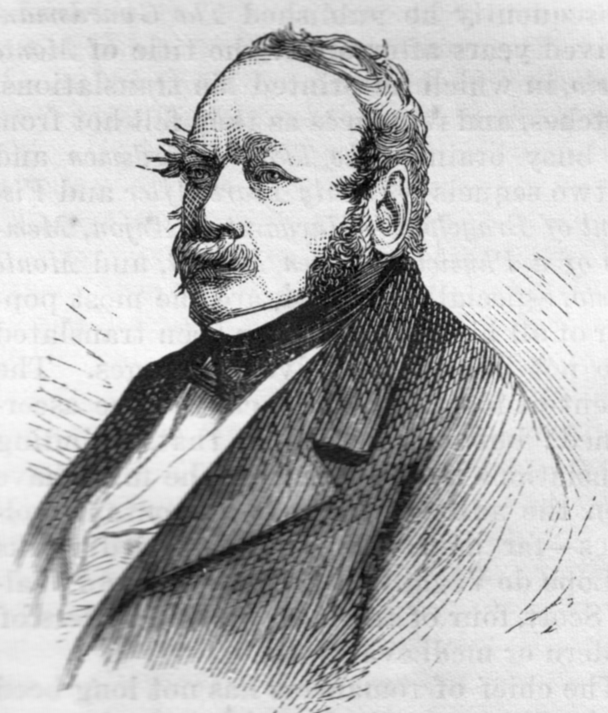 Engraving of Paul de Kock.